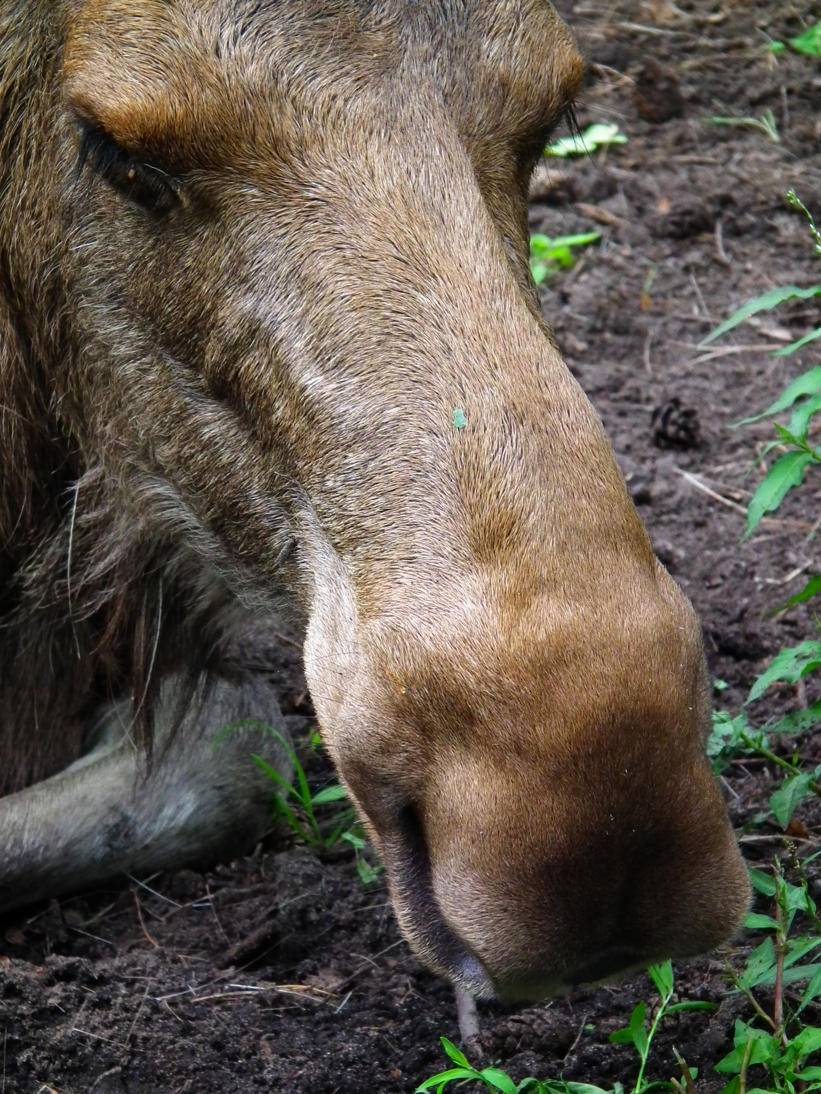 Elch (Alces alces), aufgenommen im Wildpark Alte Fasanerie in Klein-Auheim (Hessen, Deutschland)